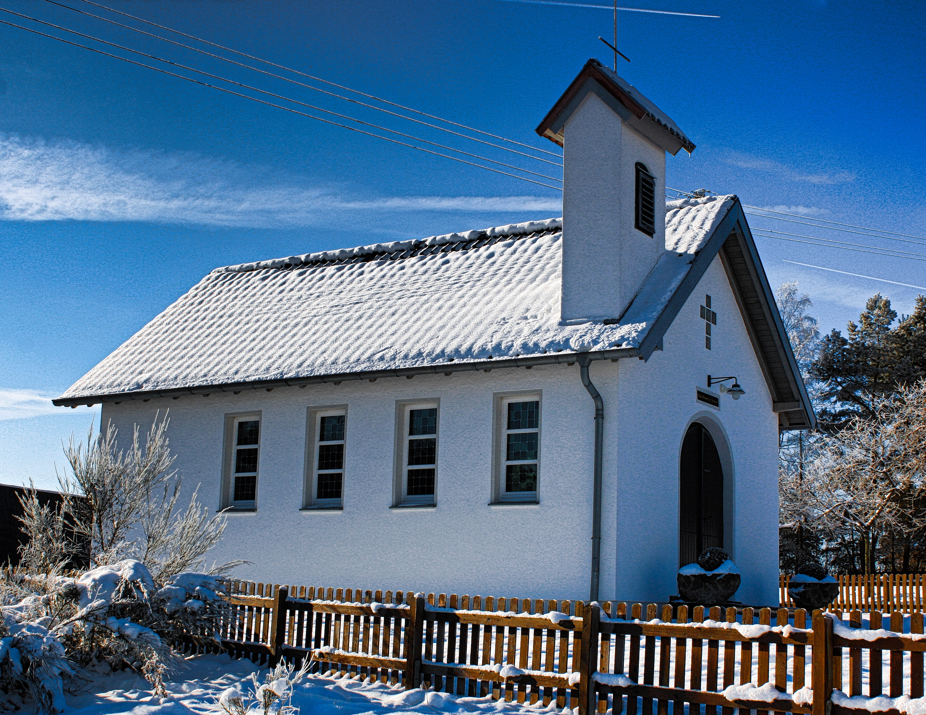 Kapelle Hummerzehim